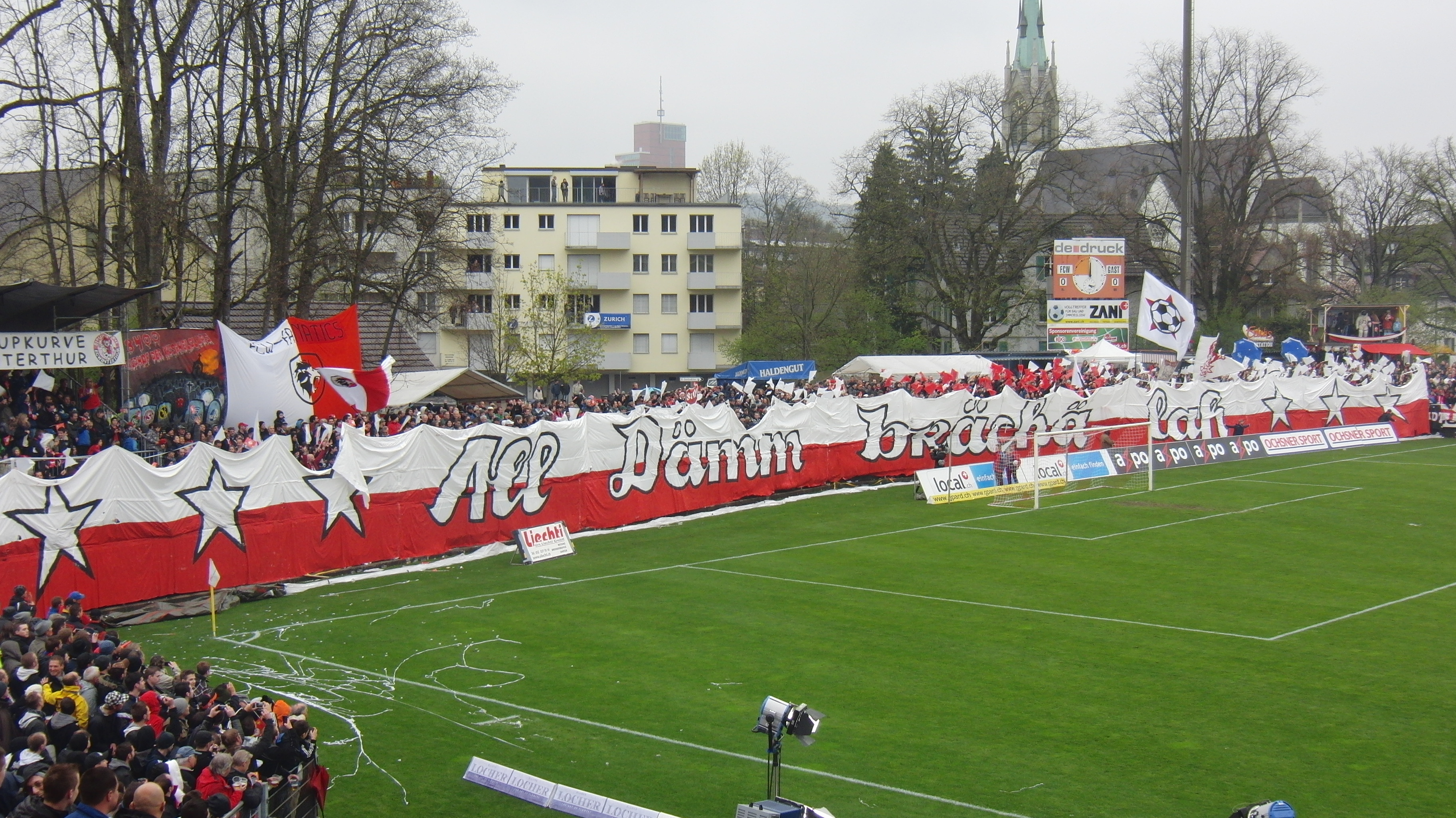 Schweizer Cup-Halbfinal vom 15. April 2012 auf der Schützenwiese